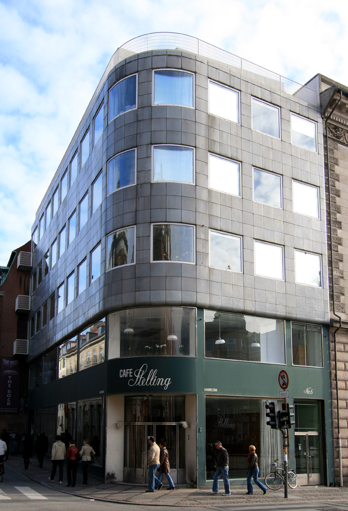 Stellings Hus, Gammeltorv 6, København. Bygget 1937-1938. Arkitekt: Arne Jacobsen. Fredet.